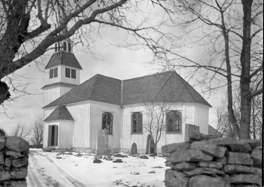 Kyrkan från sydöst.